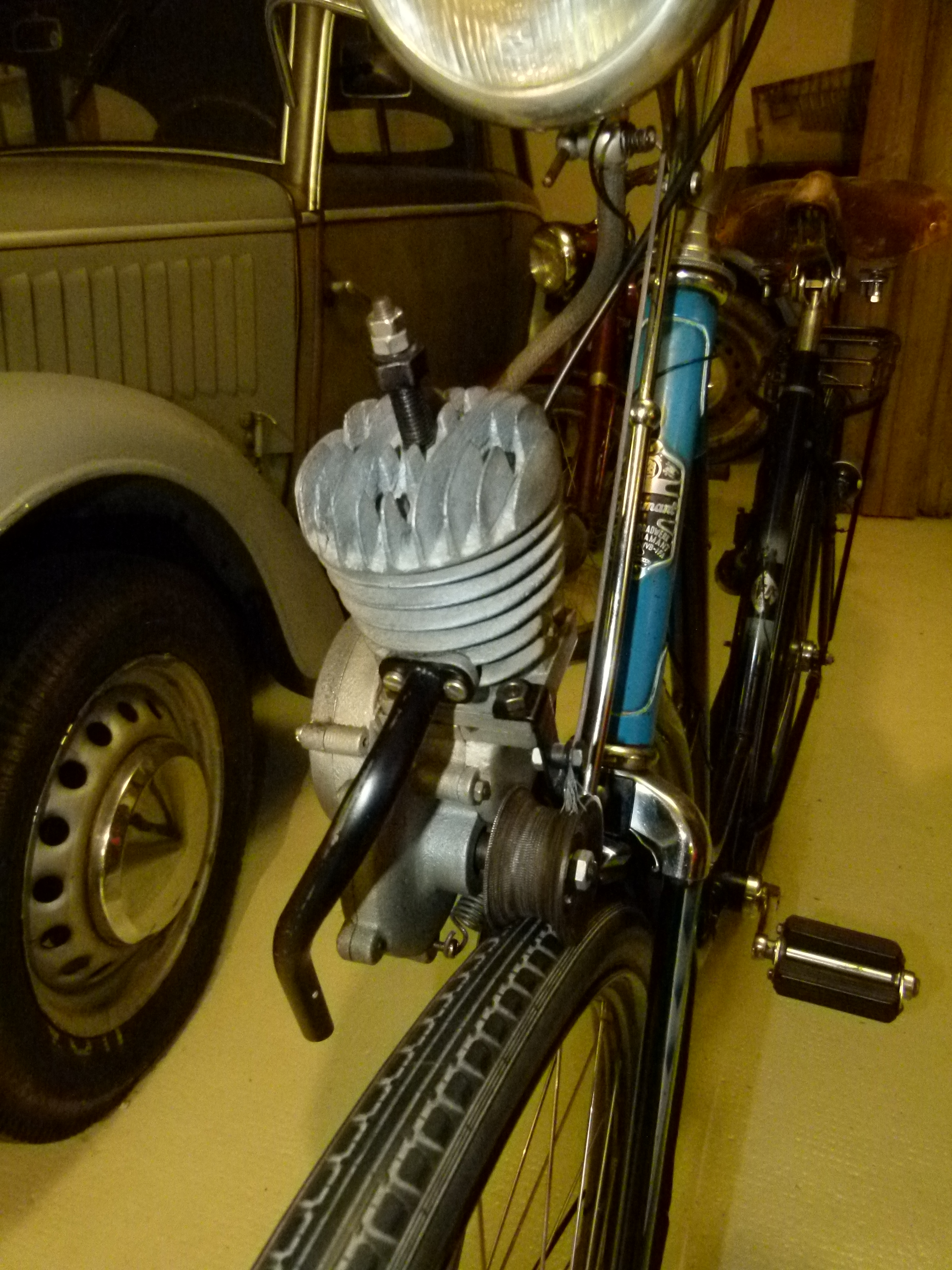 Diamantfahrrad mit Reibrollenantrieb (1950) im Fahrzeugmuseum Chemnitz